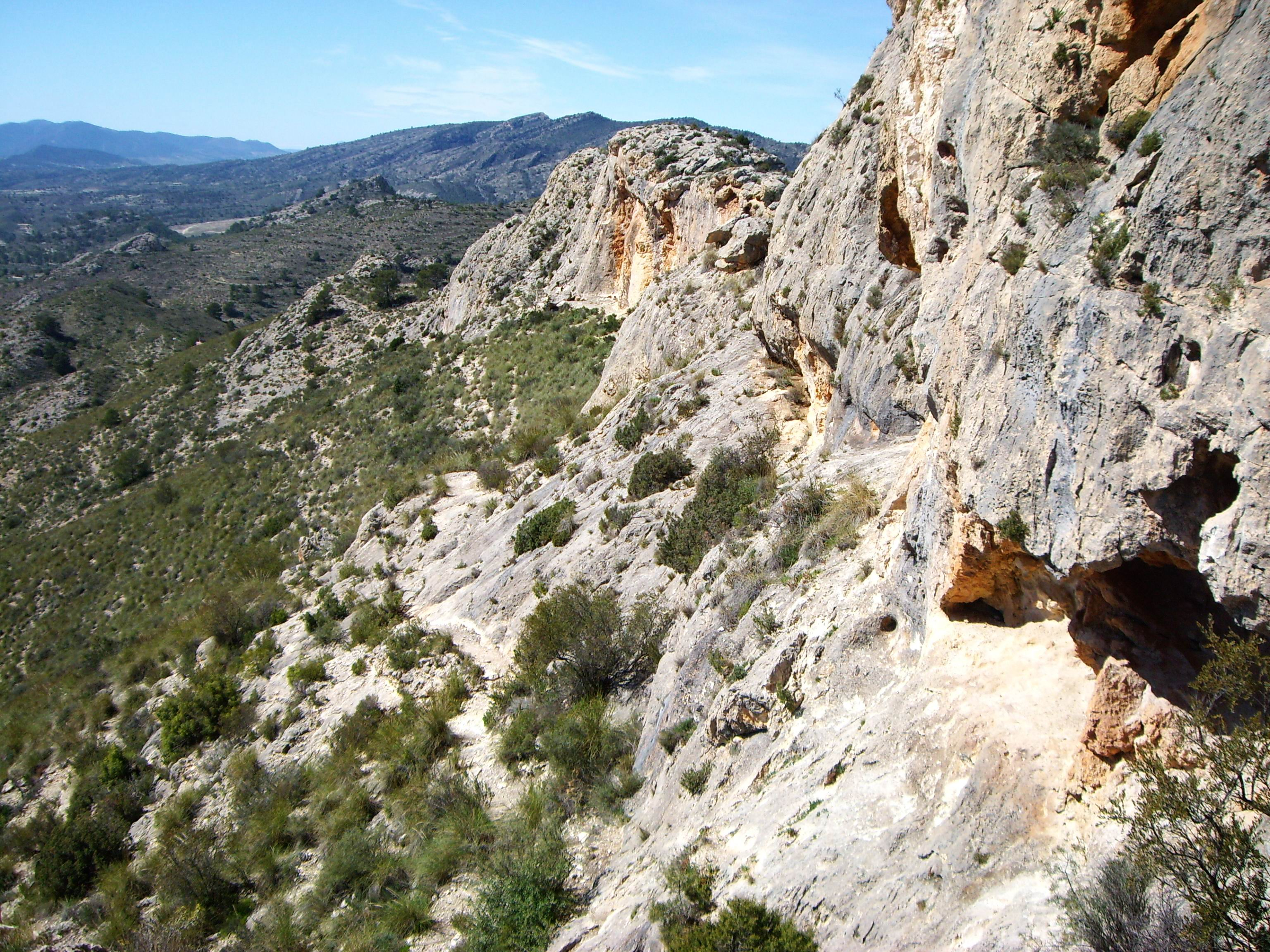 Peñas de Marín, escalada, Elda